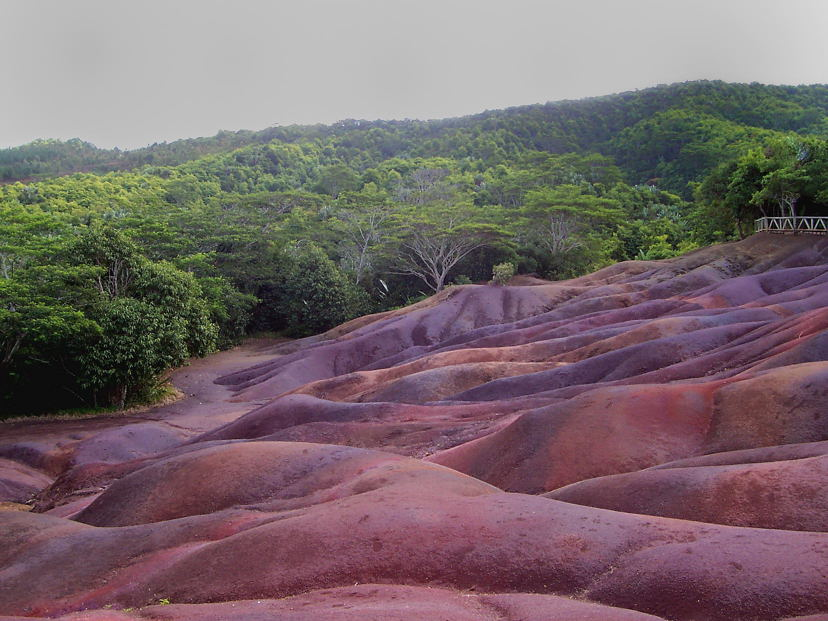 terres des 7 couleurs a Chamarel